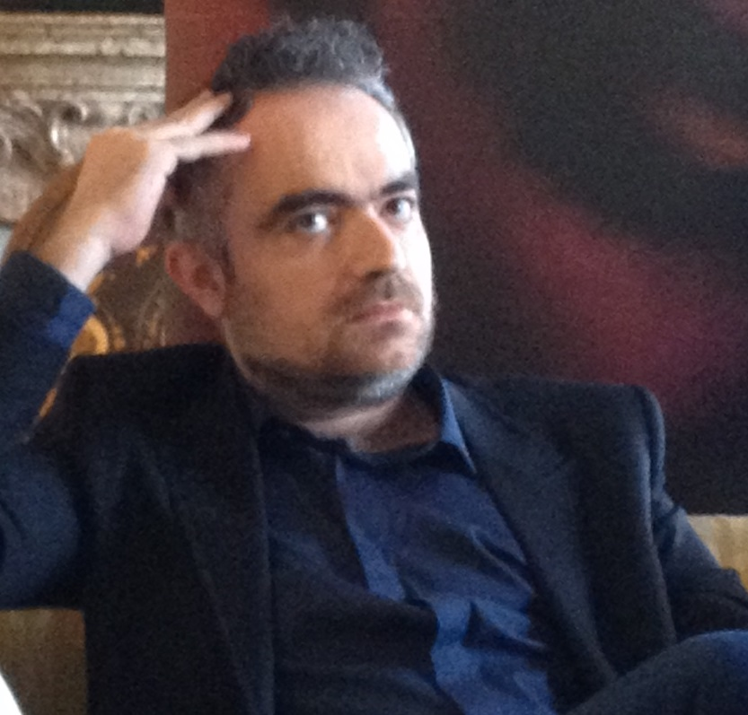 Berardo Carboni agli Incontri Internazionali di Cinema di Sorrento 2018